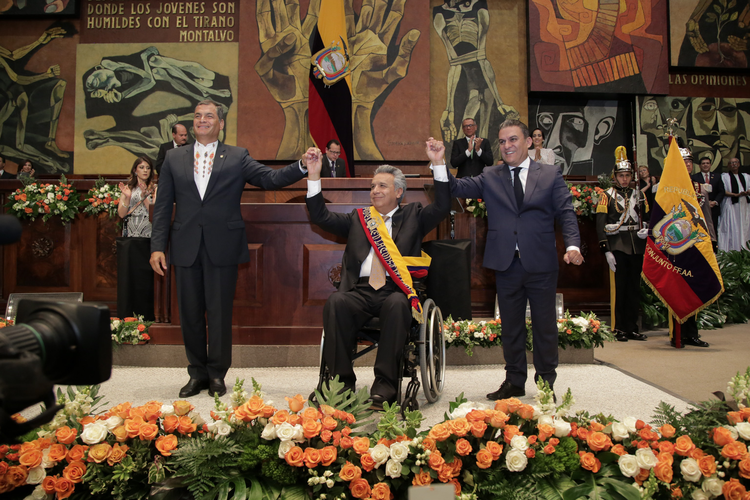 Tema: Transmisión del Mando Presidencial Ecuador 2017. Fotografía: Alberto Romo/Asamblea Nacional